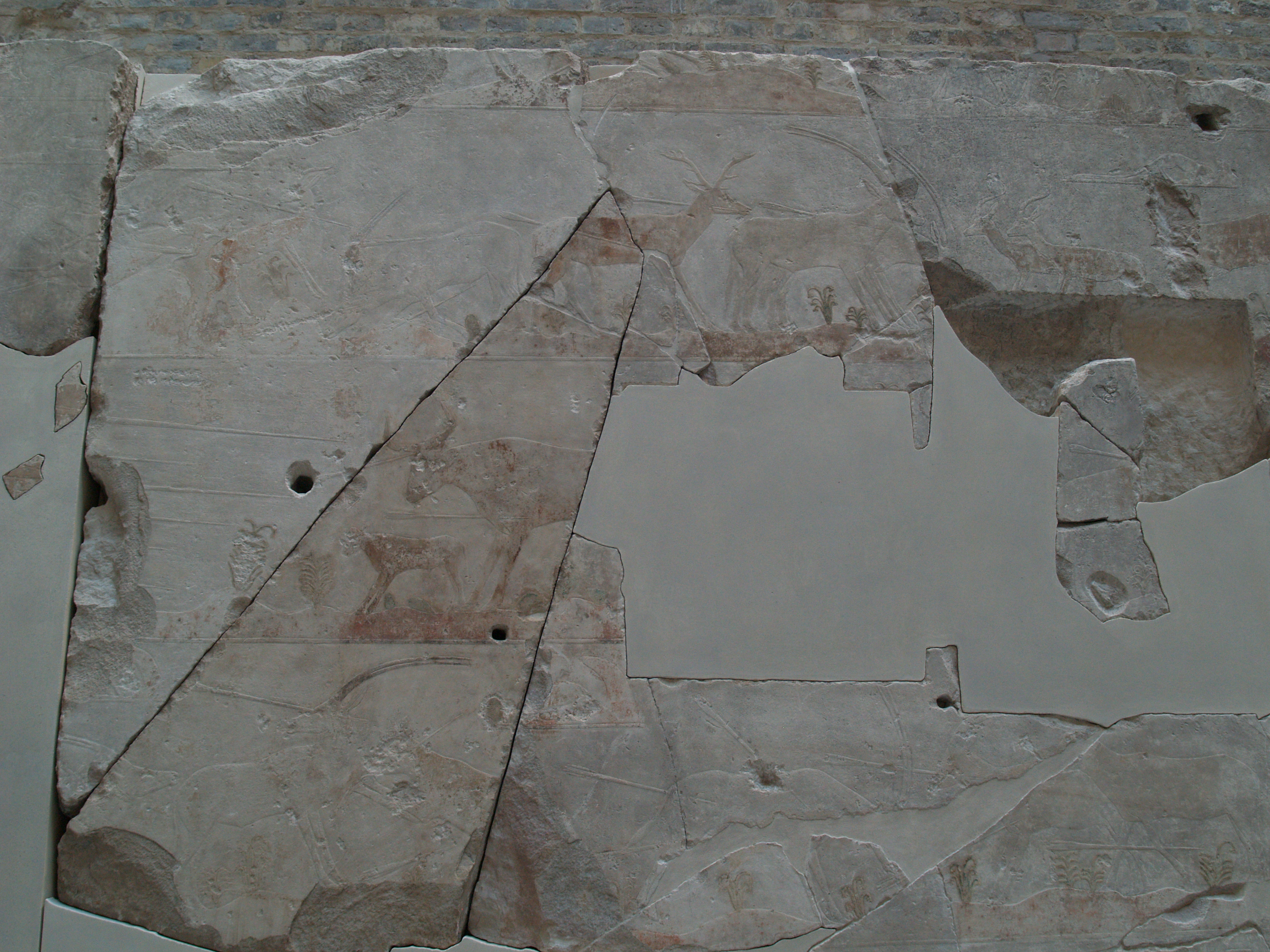 Berlín. Neues Museum. Relieves del templo funerario del faraón Sahure (V d.).